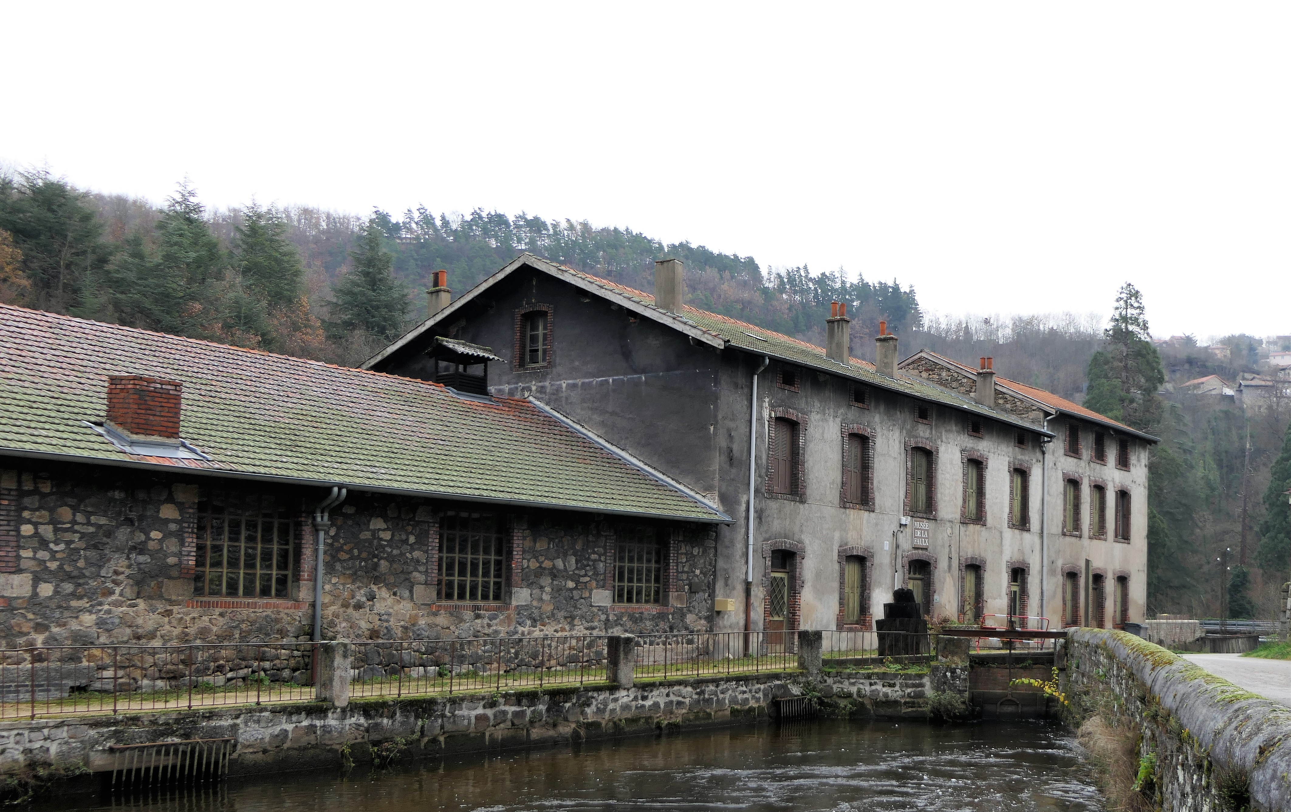 Le musée de la faulx implantée dans les anciens bâtiments de l'usine de faulx Holtzer, Dorian, Jackson